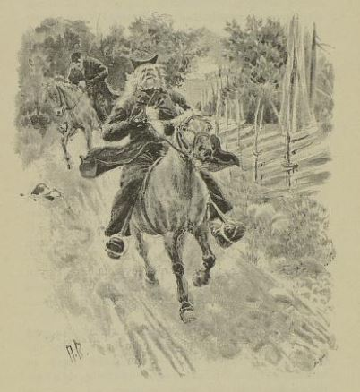 Tegning til novella Da prinsen kom